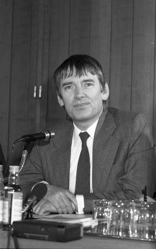 17.2.1983 Pressekonferenz der "Grünen" im Restaurant Tulpenfeld (zur Bundestagswahl am 6.3.1983)